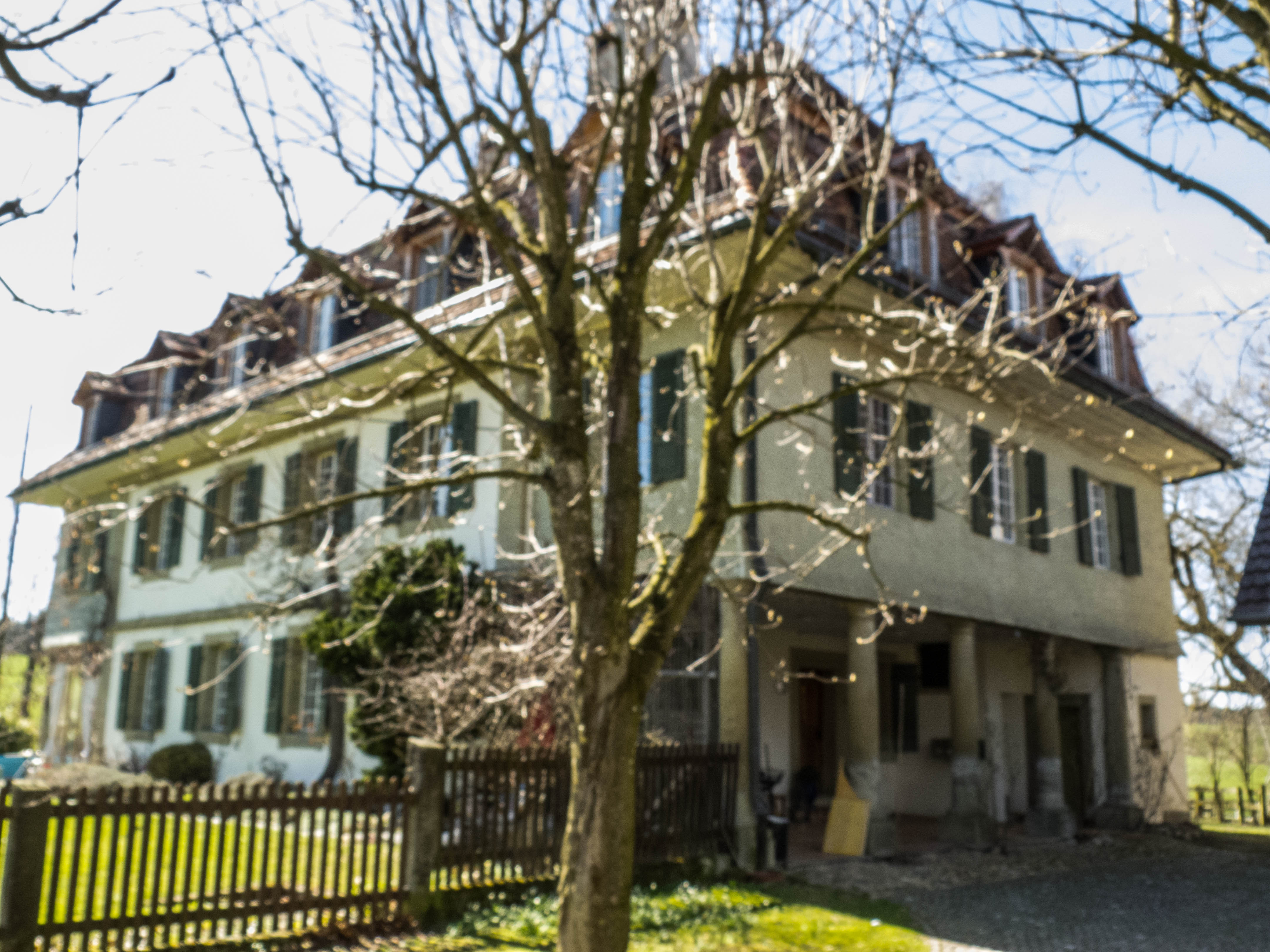 Landsitz Grächwil, Gemeinde Meikirch